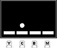 A sorozatos reakcióidő feladat egy lehetséges elrendezése, mikor a megjelenő ingerek helyét az 'Y' 'C' 'B' és 'M' billentyűk jelölik